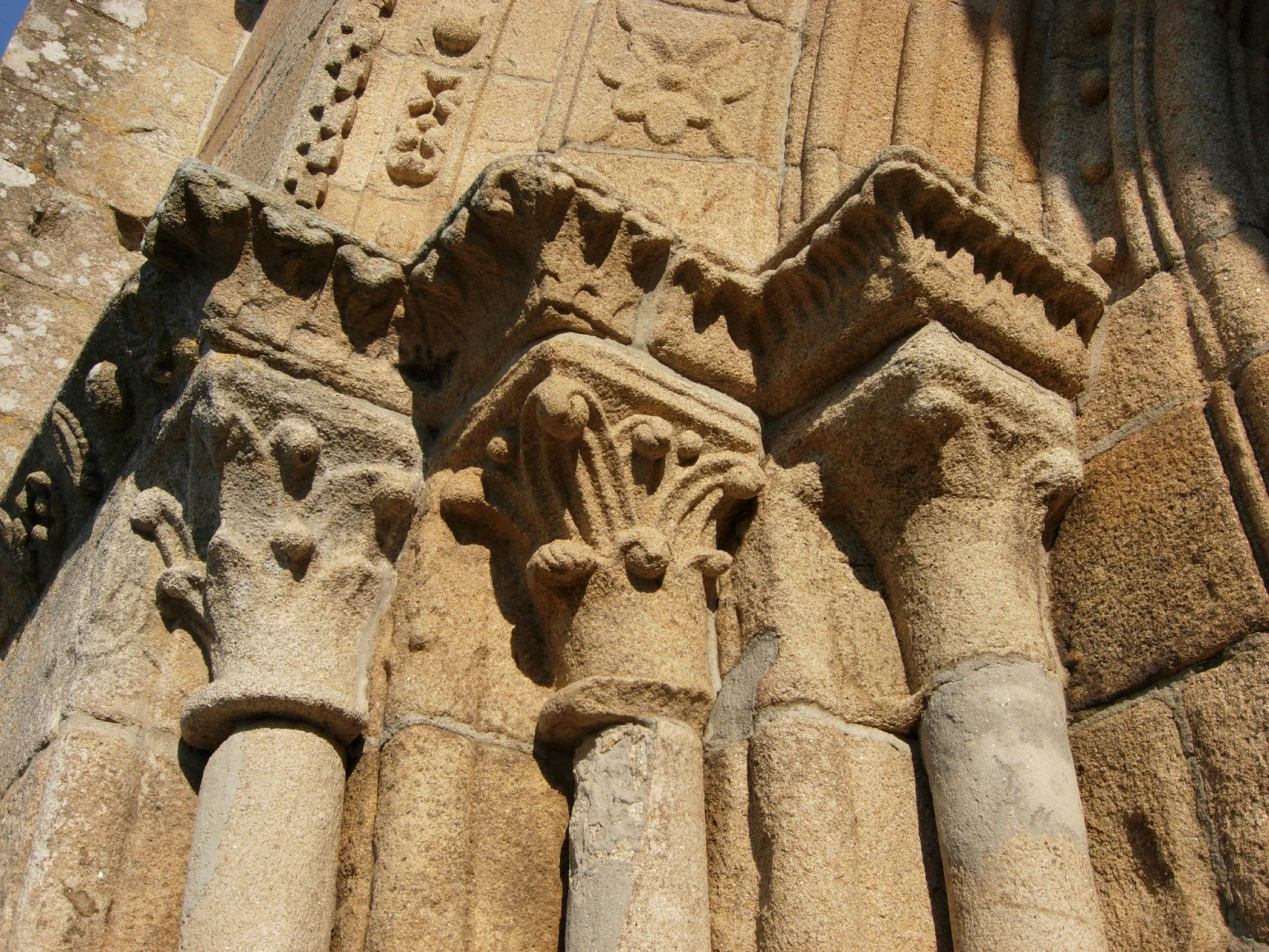 Capiteles de la portada occidental.